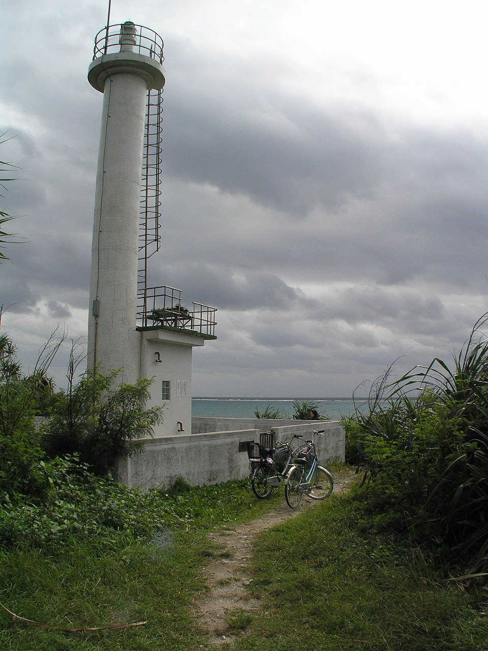 黒島灯台